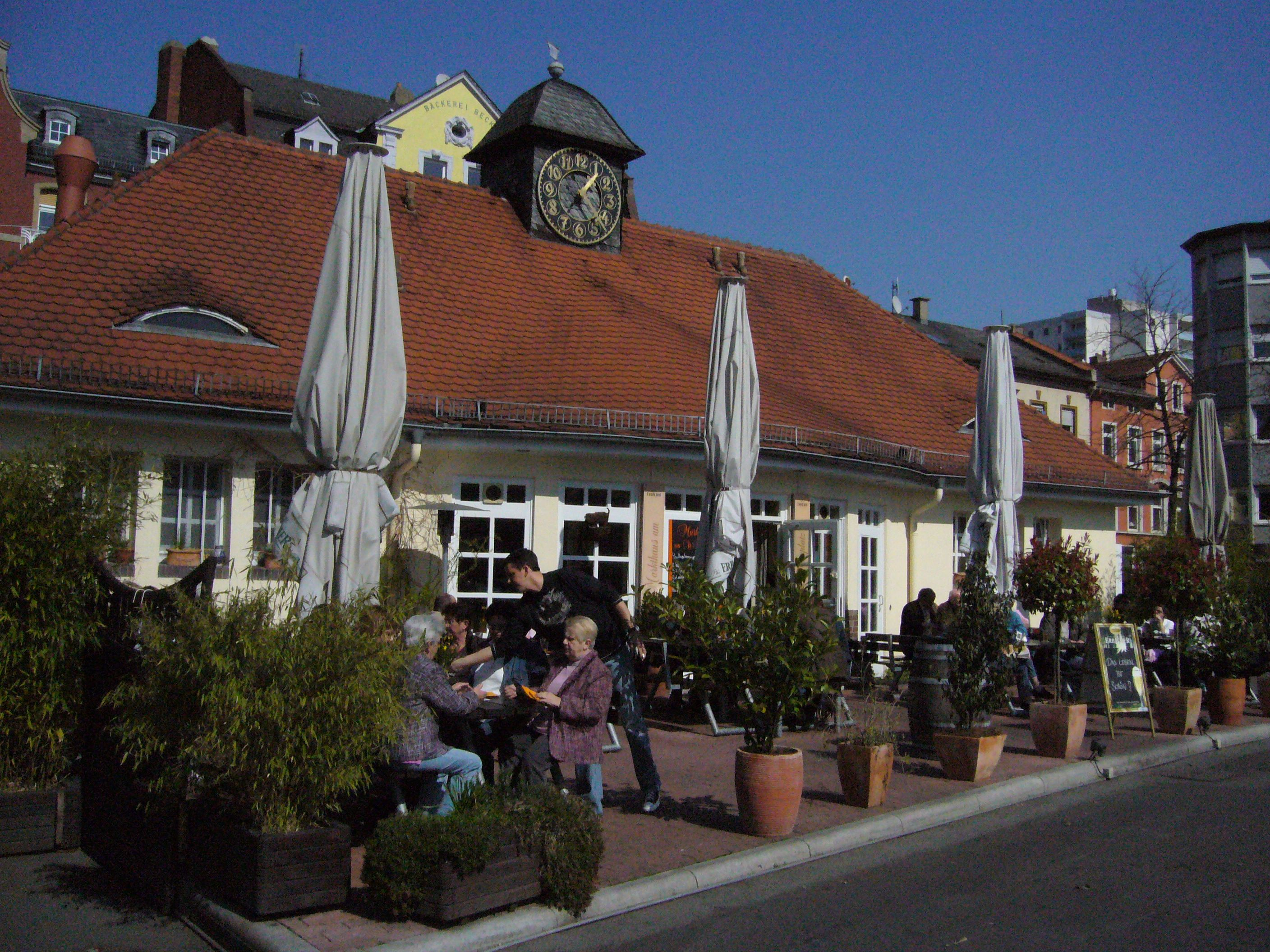 Das Markthäuschen, beliebter Treffpunkt am Wilhelmsplatz in Offenbach am Main, Bieberer Straße 9B